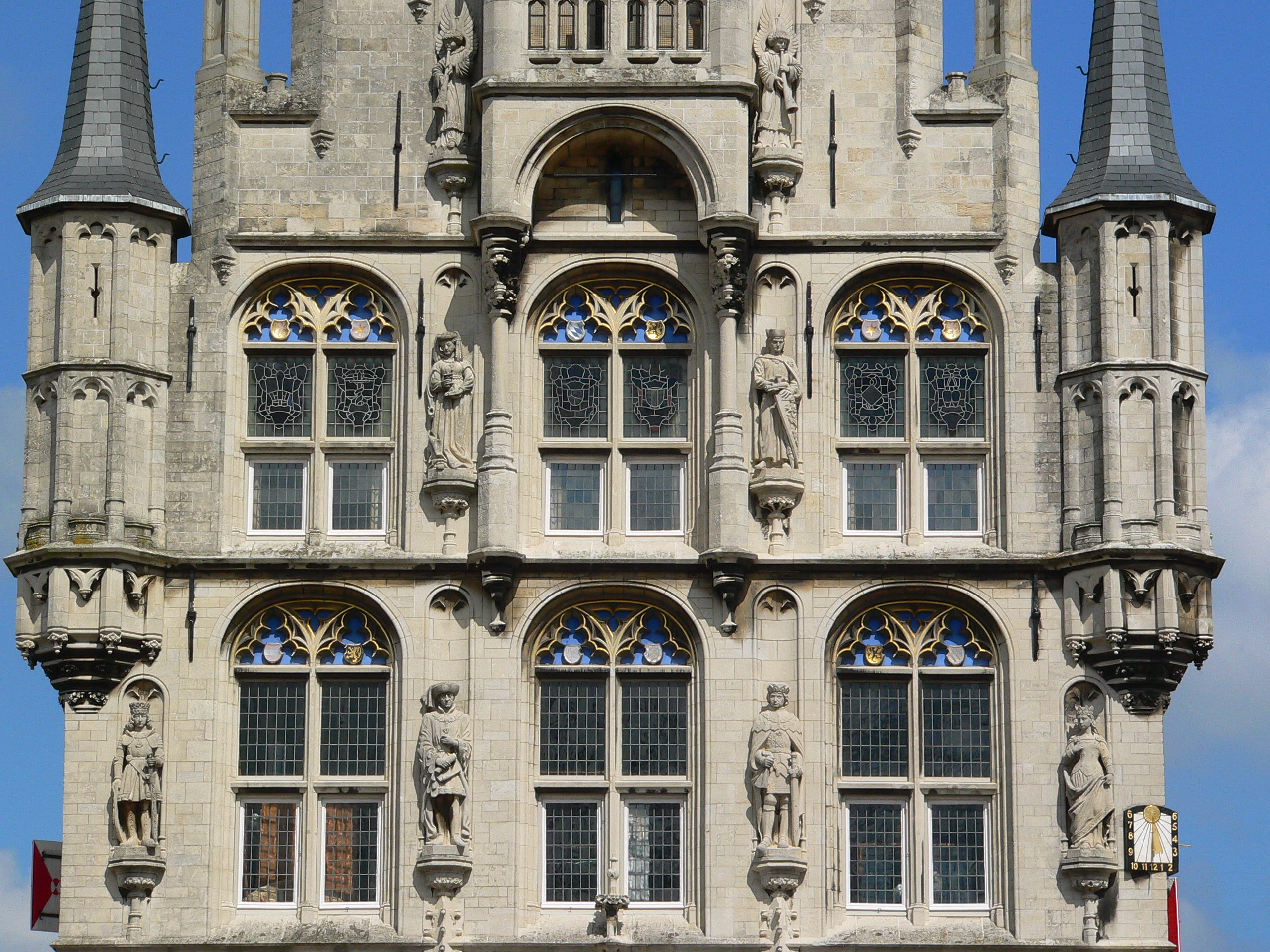 Voorzijde met sculpturen en kruiskozijnen van het oude stadhuis van Gouda in het centrum van de stad